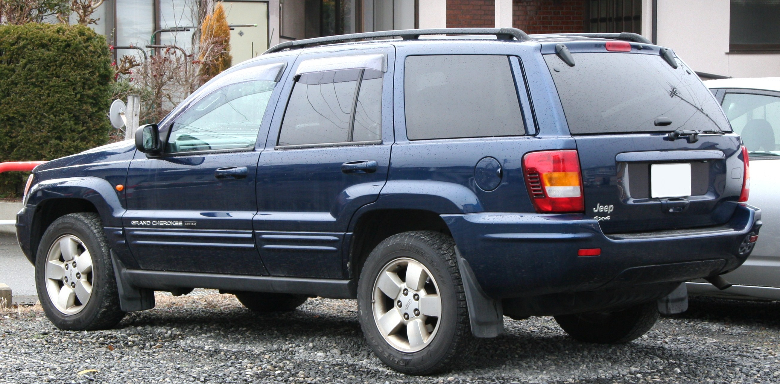 Jeep Grand Cherokee